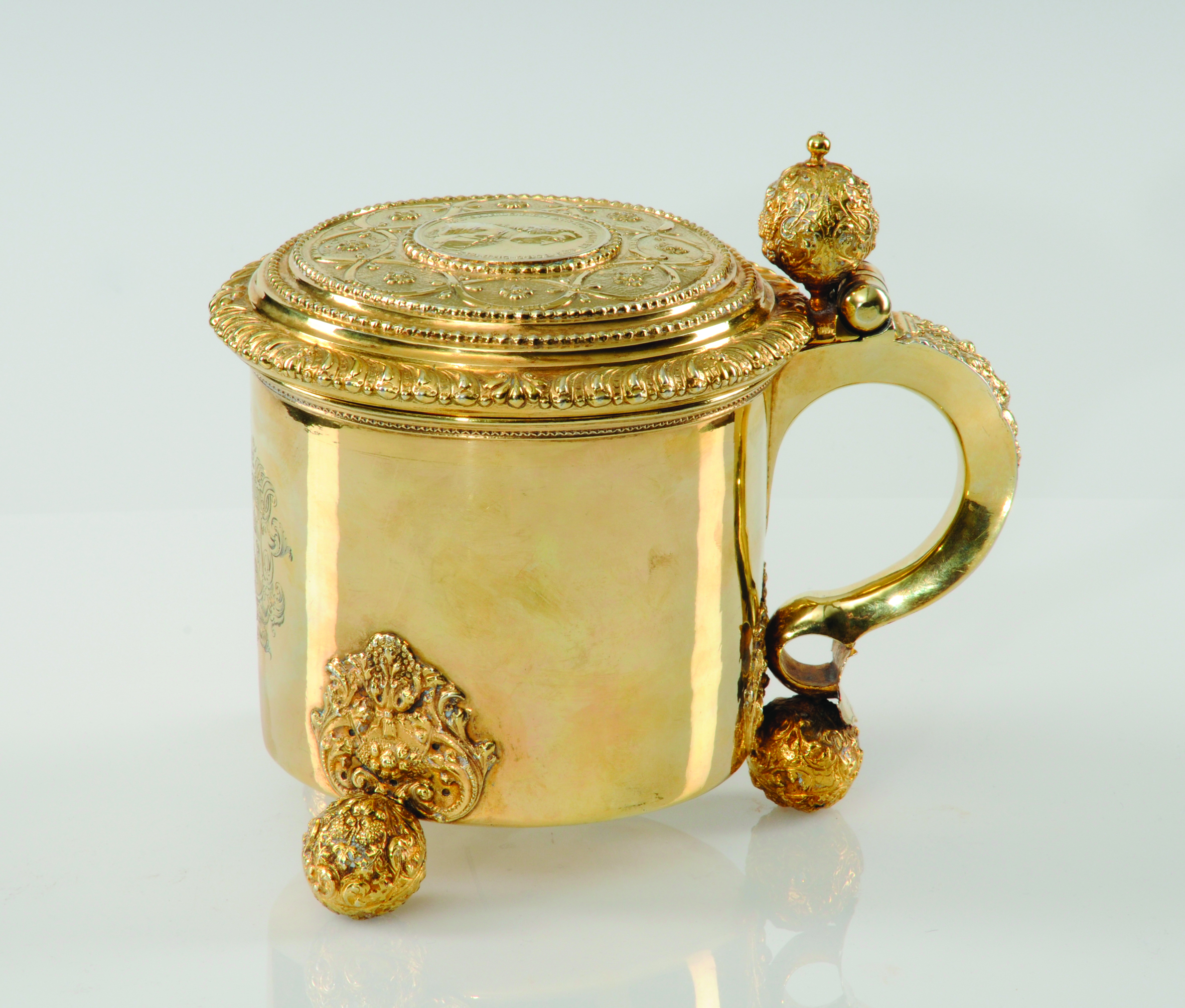 Silverkanna (Göteborg, 1715) med medalj föreställande Niclas Sahlgren